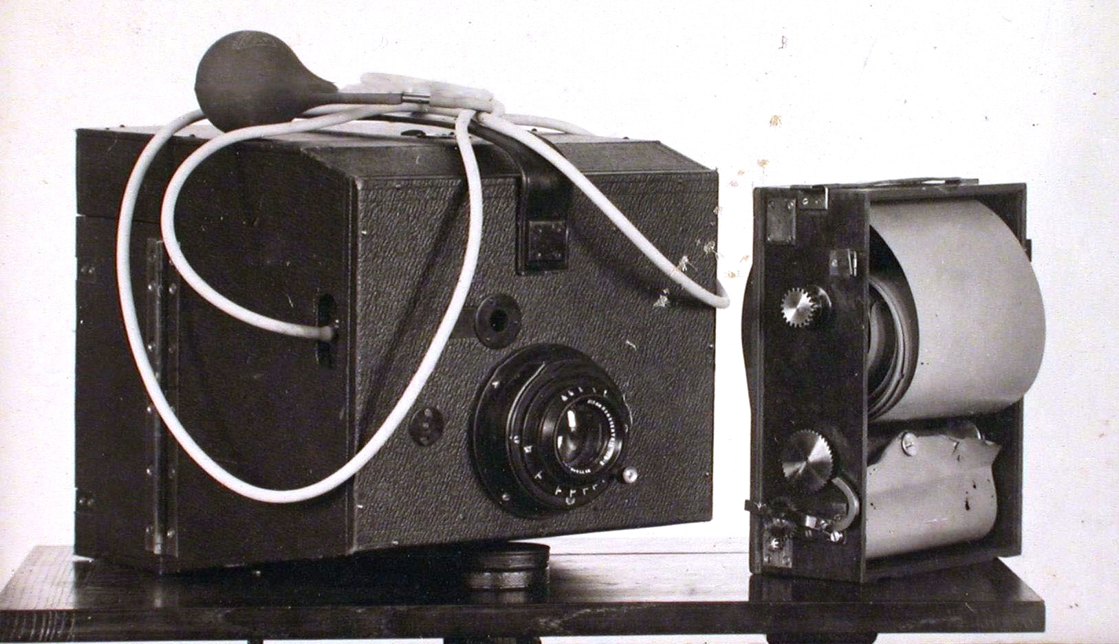 Фотографический аппарат полковника Потте